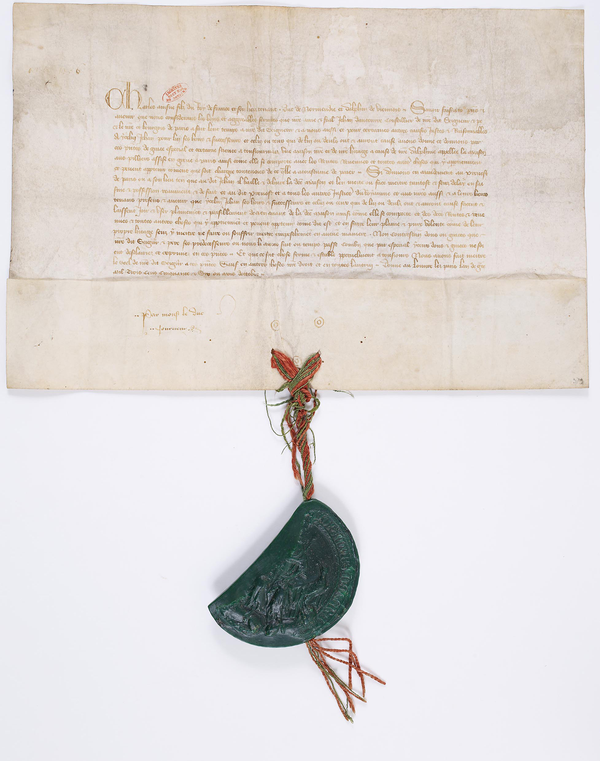 Don par le Dauphin (futur Charles V) au conseiller du roi Jean d’Auxerre de la « Maison aux piliers » Sise en Grève à Paris. Palais du Louvre, octobre 1356